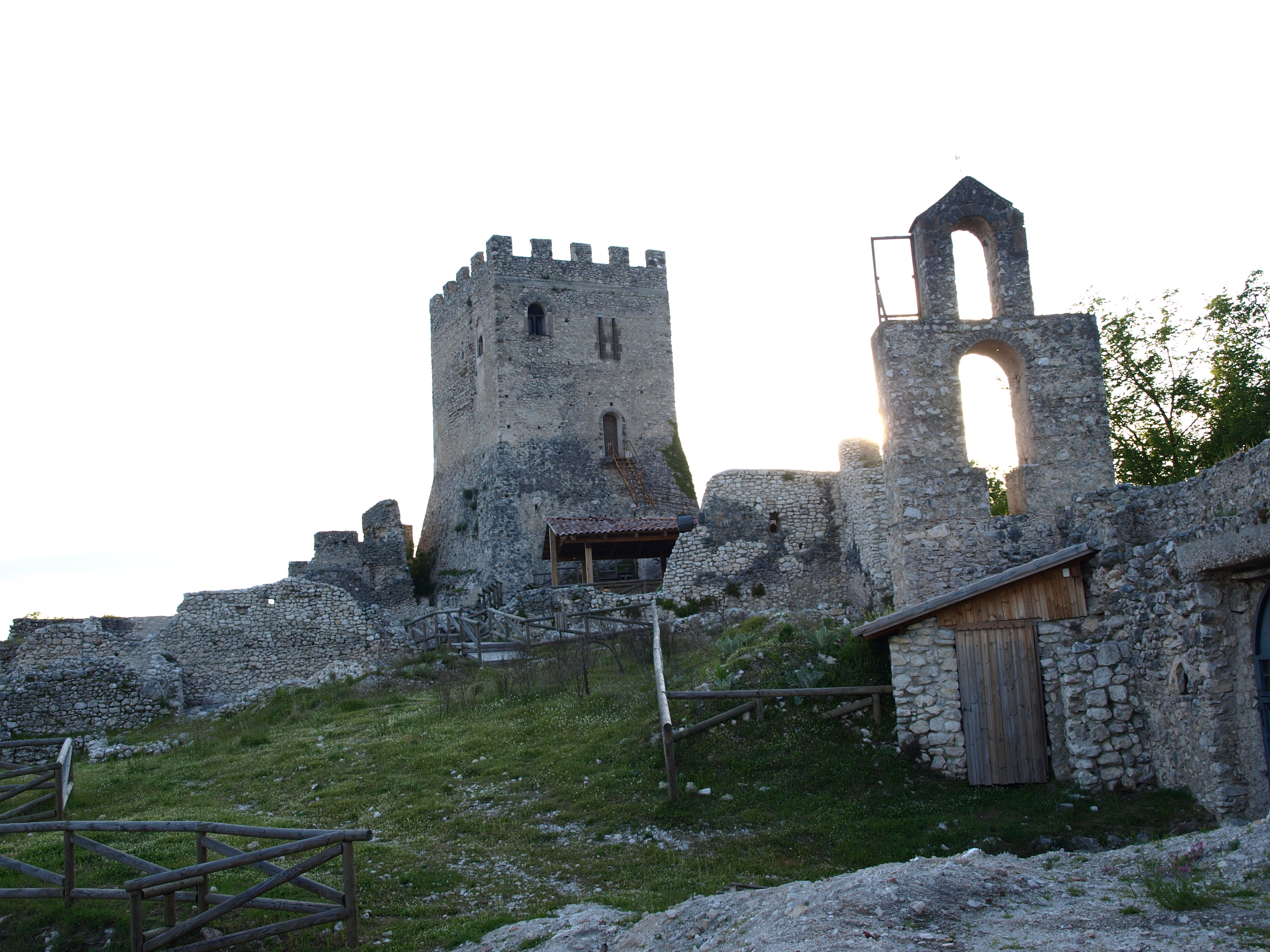 Castrum Sancti angeli de Ravecanina, situazione attuale del complesso